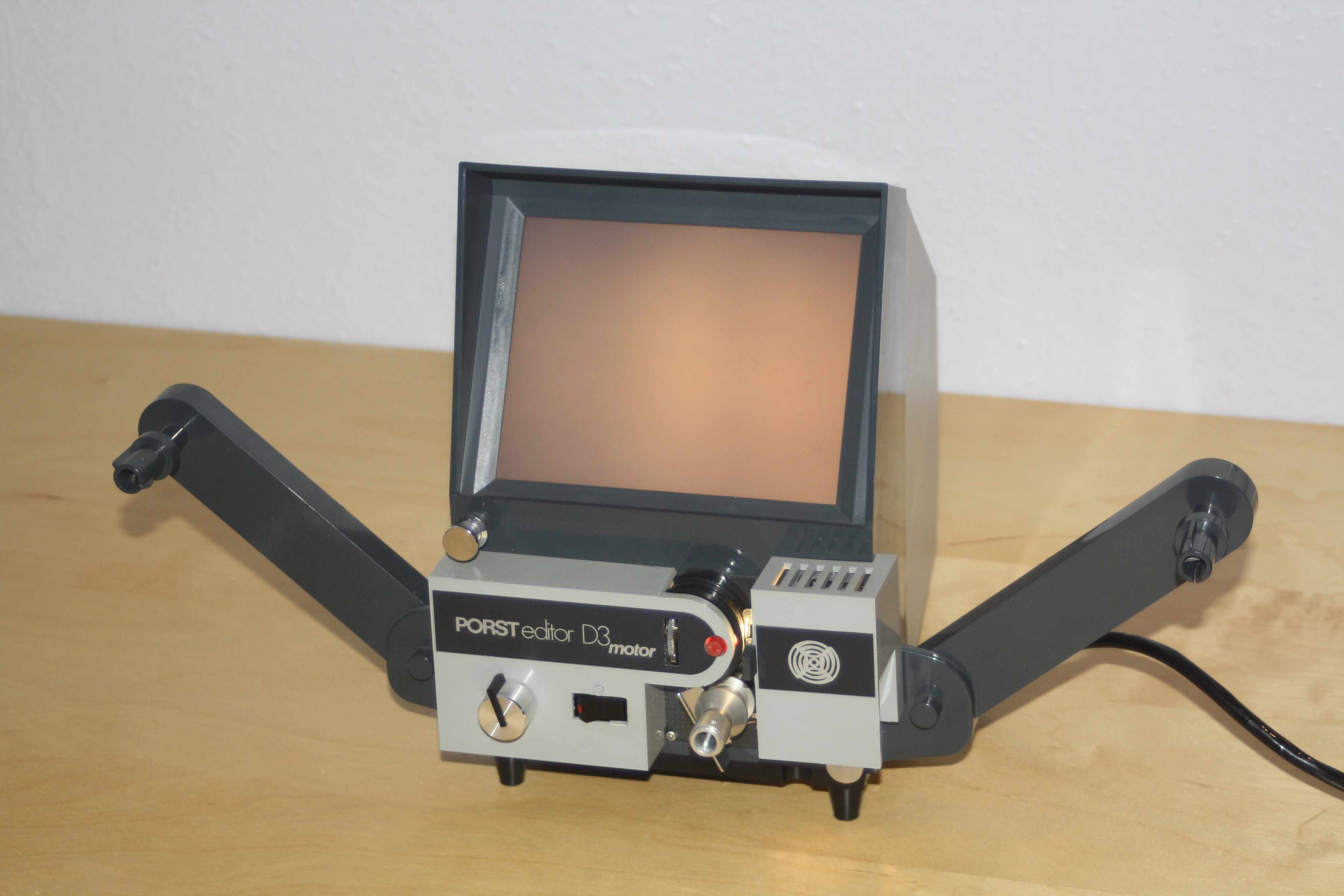 8mm Filmbetrachter Porst editor D3 motor